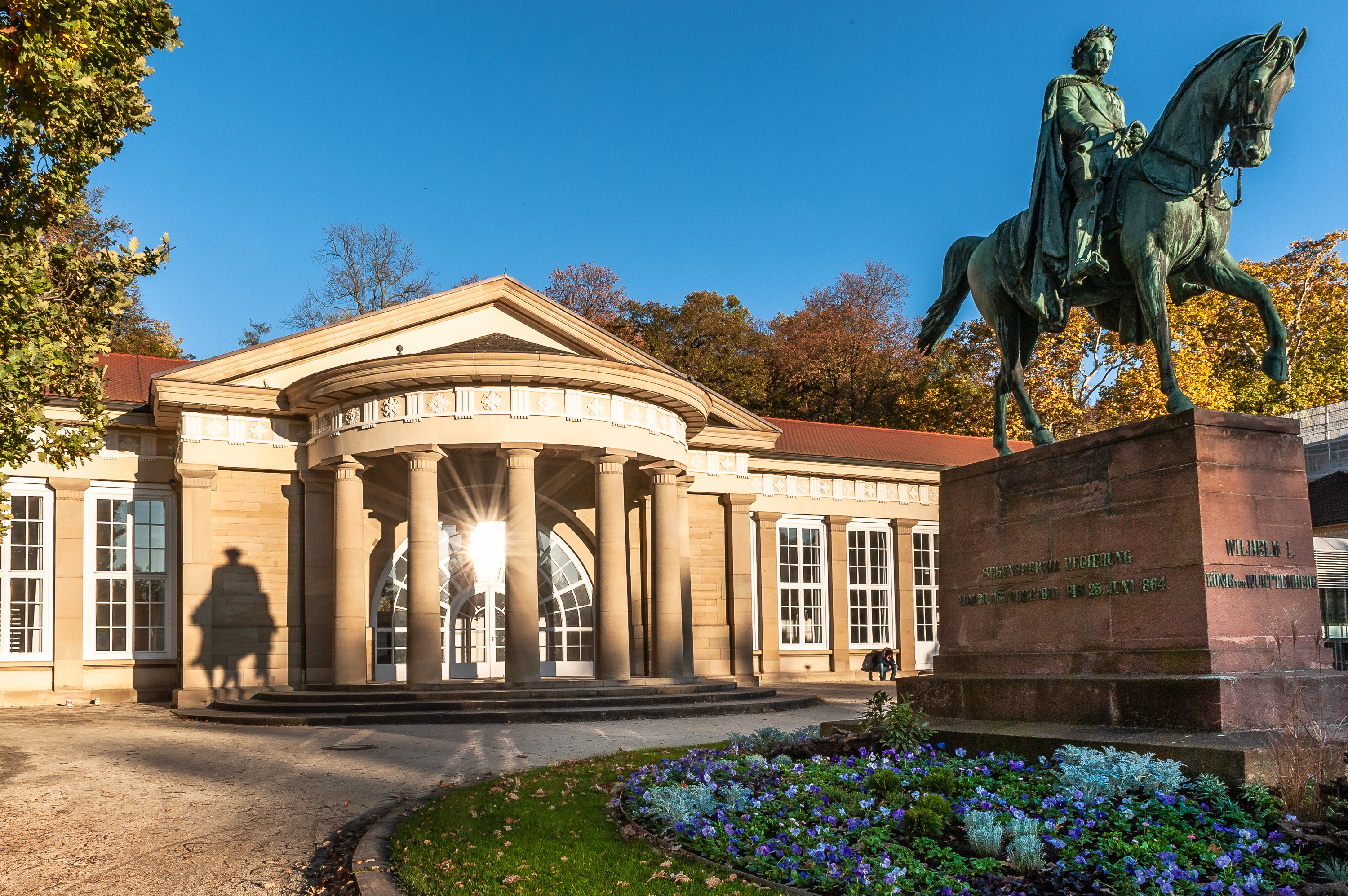 Großer Kursaal und Denkmal für König Wilhelm I., Stuttgart-Bad Cannstatt